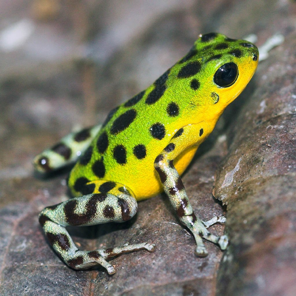 pumilio morph colon variations "la gruta"